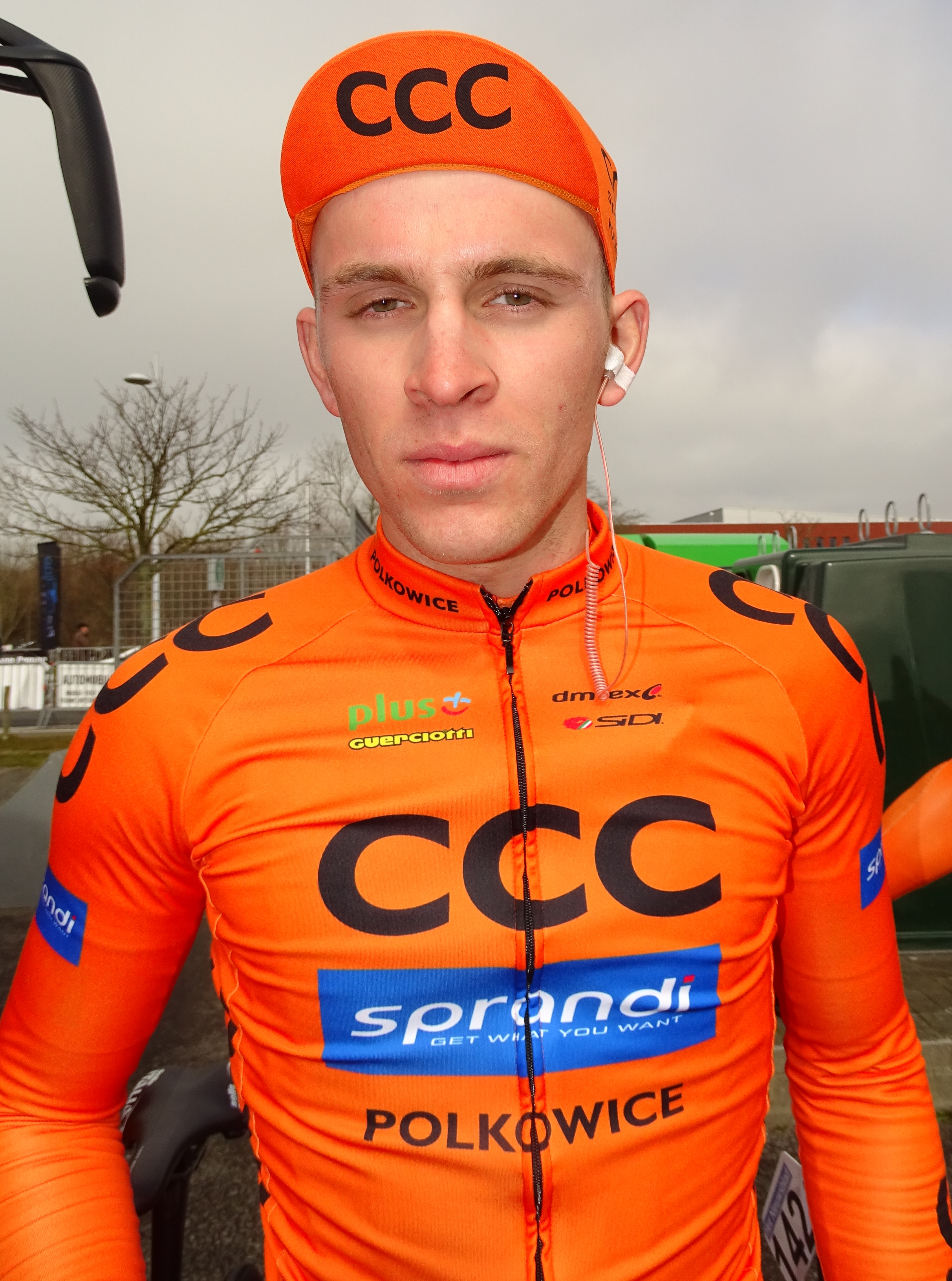 Reportage réalisé le vendredi 18 mars à l'occasion du départ de la Handzame Classic 2016 à Bredene, Belgique.